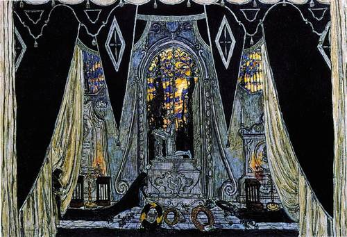 Могила Командора. 1917 Эскизы декораций к опере А.С. Даргомыжского "Каменный гость" Фанера, темпера, бронза, серебро. 79 x 115 см Государственный Русский музей